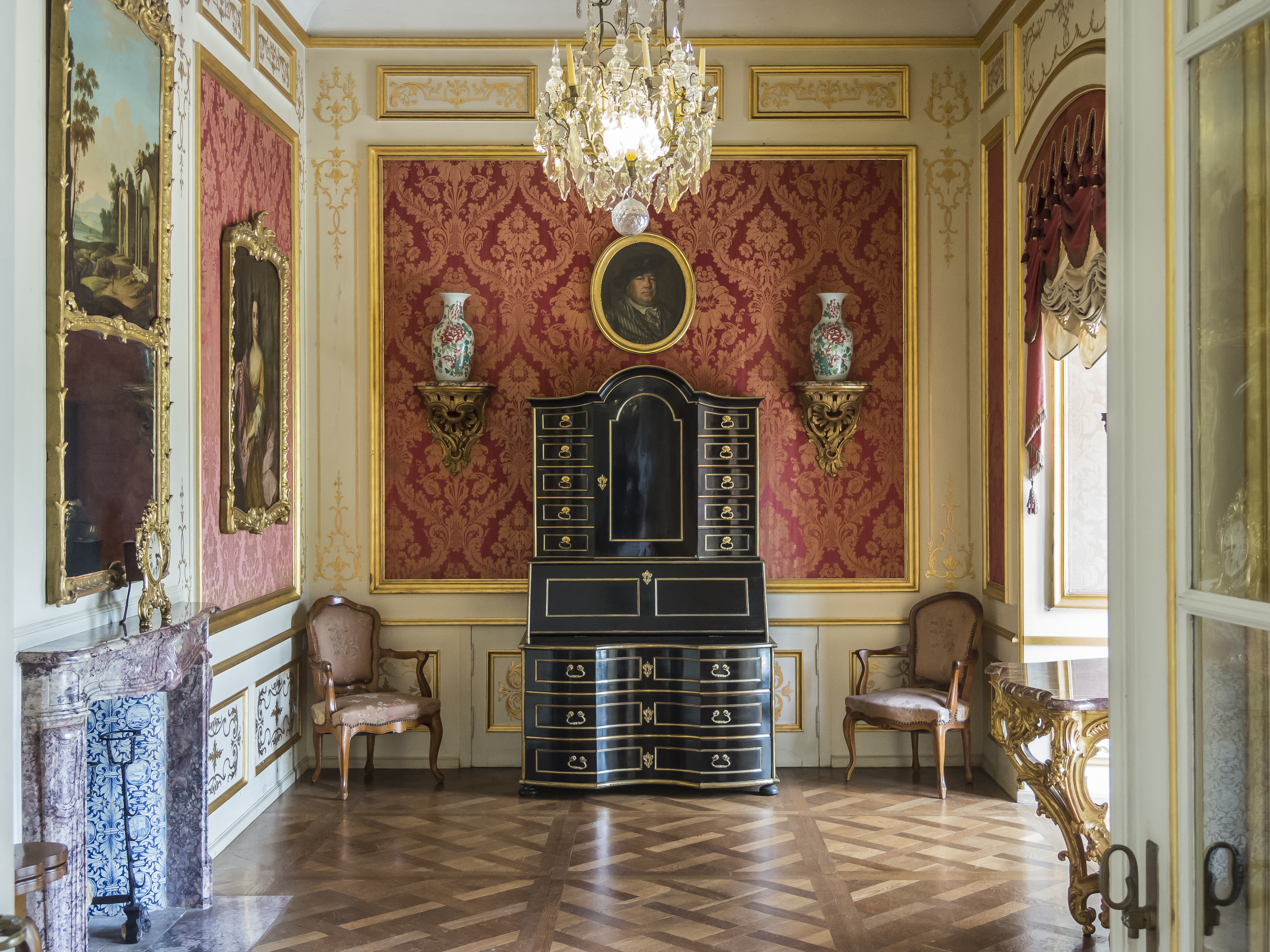 Schloss Jegenstorf Innenansicht